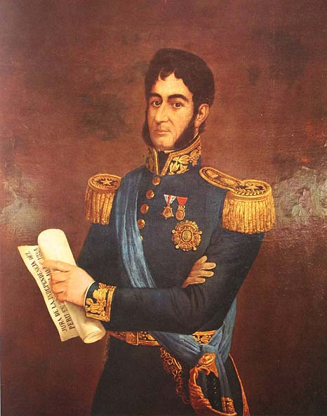 Retrato de José de San Martín (1778-1850)